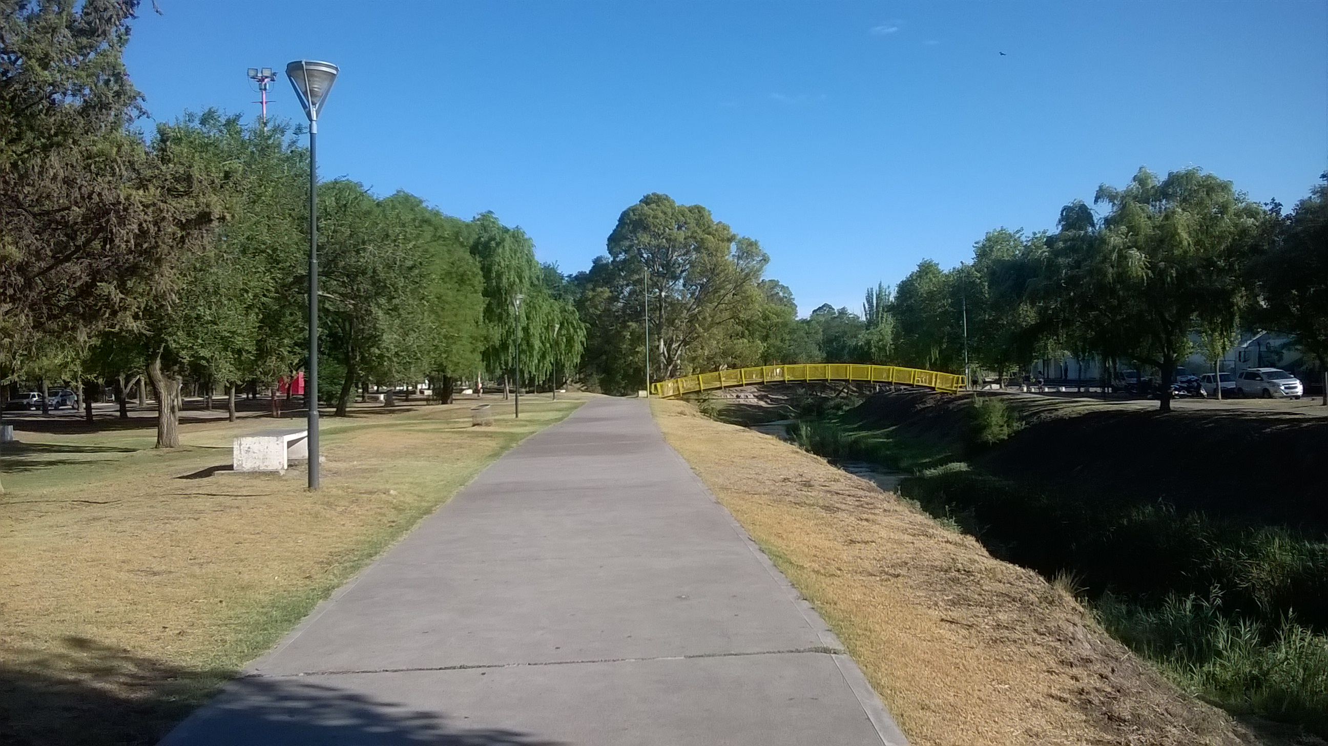 Paso de las Esculturas con el Arroyo Napostá, Bahia Blanca